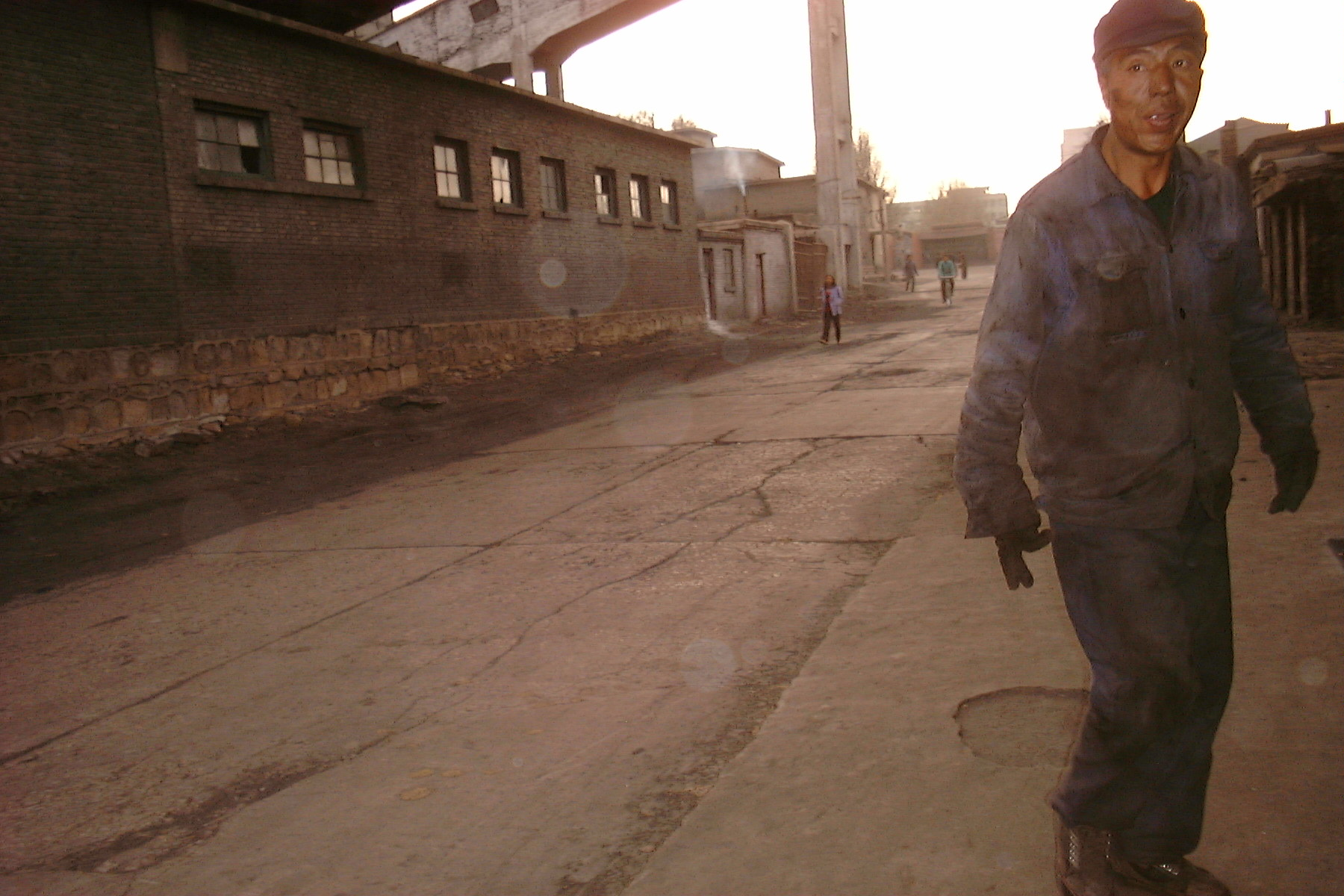 Jin Hua Gong Mine, Datong, Shanxi, China